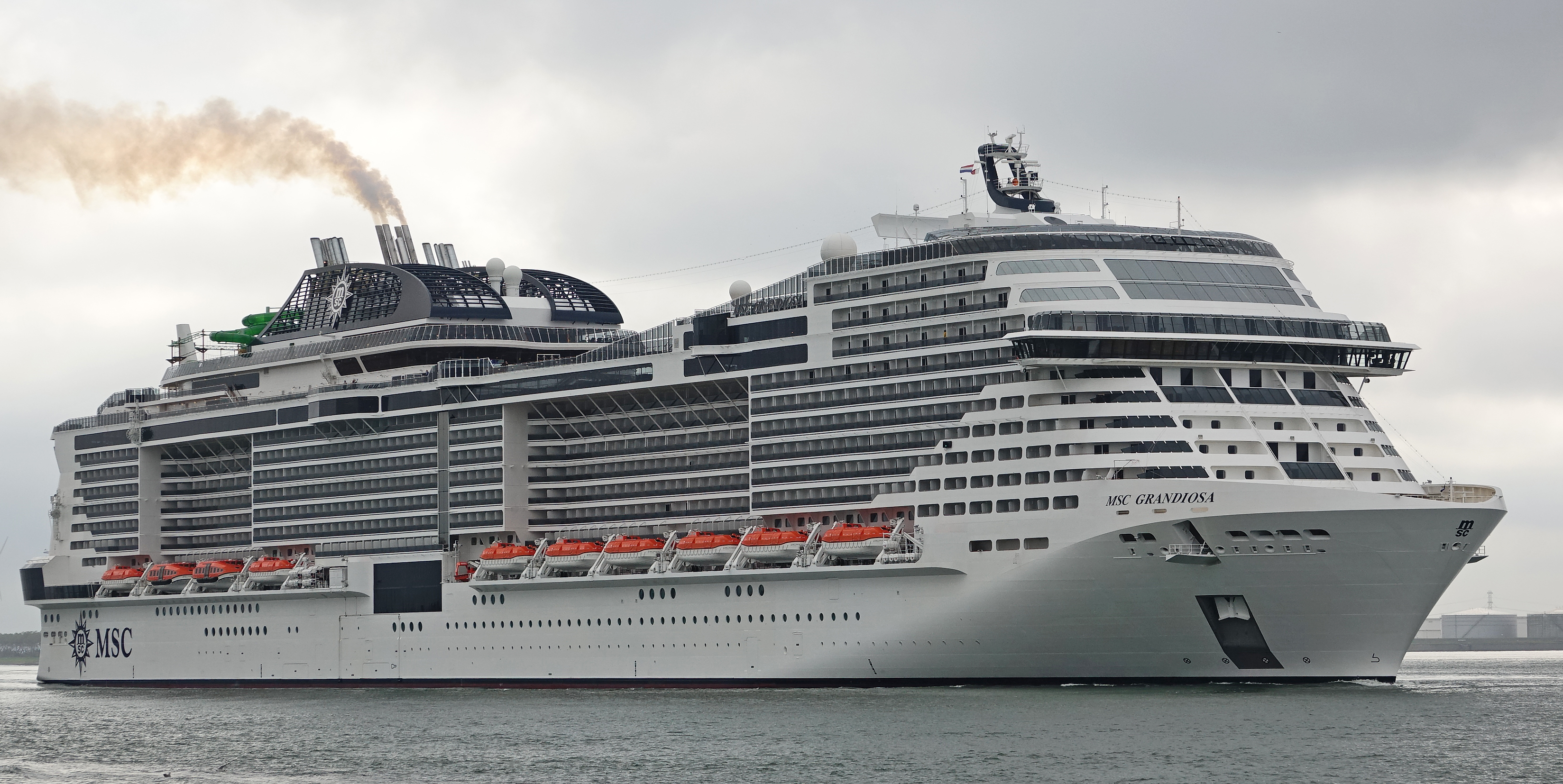 Hoek van Holland 5-11-2019 , het cruiseschip vertrok naar Hamburg , daar zal het enorme cruiseschip op 9 november door de Italiaanse actrice Sophia Loren worden gedoopt .